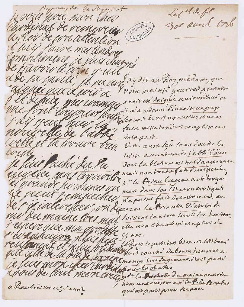 Le cardinal de Fleury, Premier ministre de Louis XV, donne des nouvelles de Versailles à la reine Marie Leszczynska, alors éloignée de la Cour, et lui annonce entre autres la mort du Prince Eugène. La reine lui répond dans la marge, 30 avril 1736